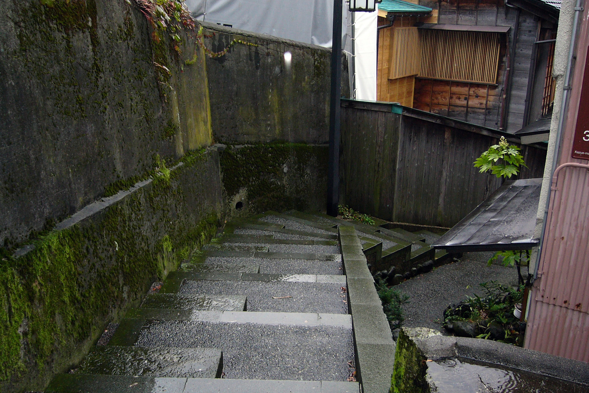 Kuragarizaka (暗がり坂), Kanazawa, Ishikawa, Japan